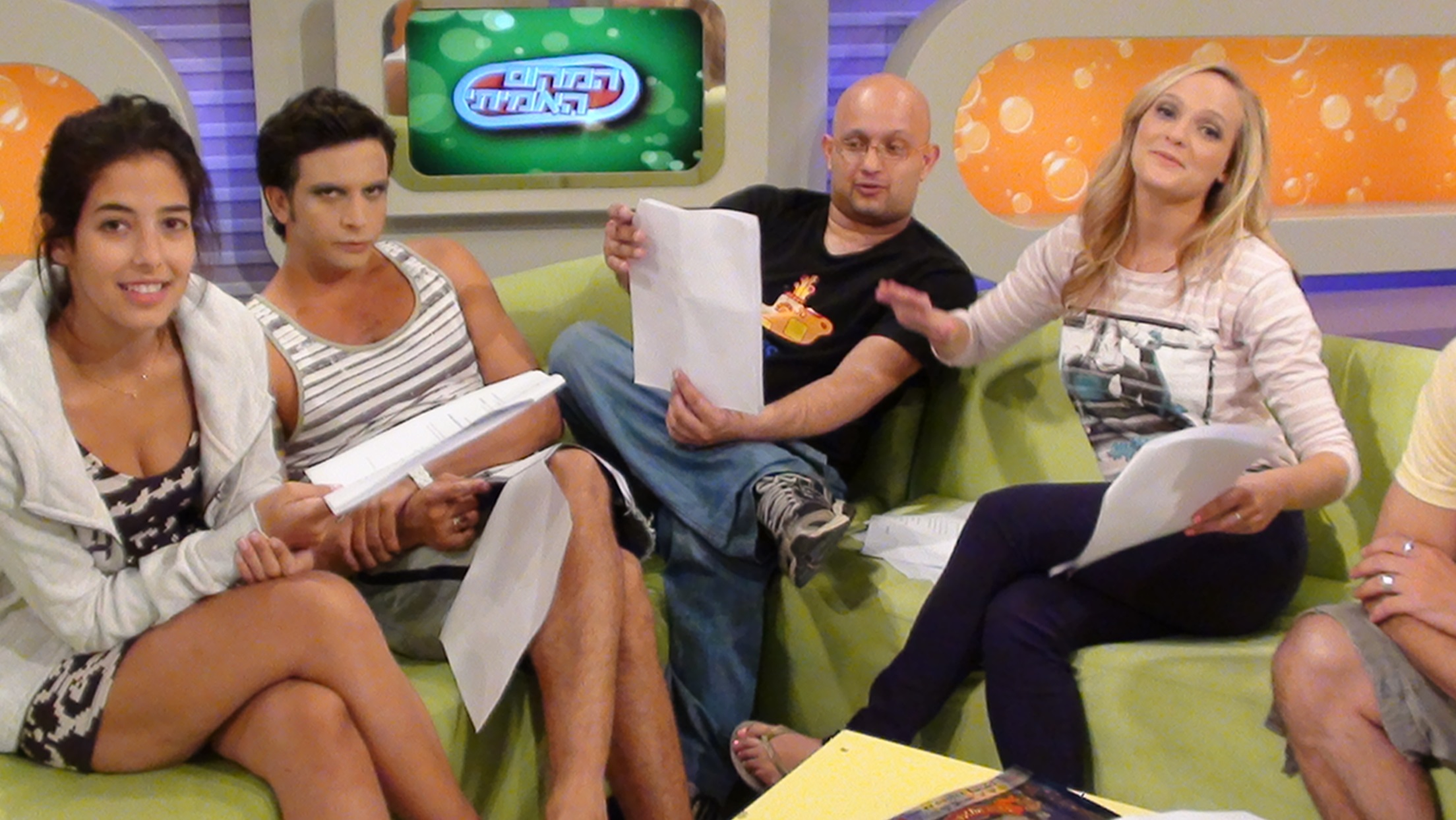 בערוץ הילדים - רוני דואני - אלון גור אריה - מושיק גלמין - דון לני גבאי